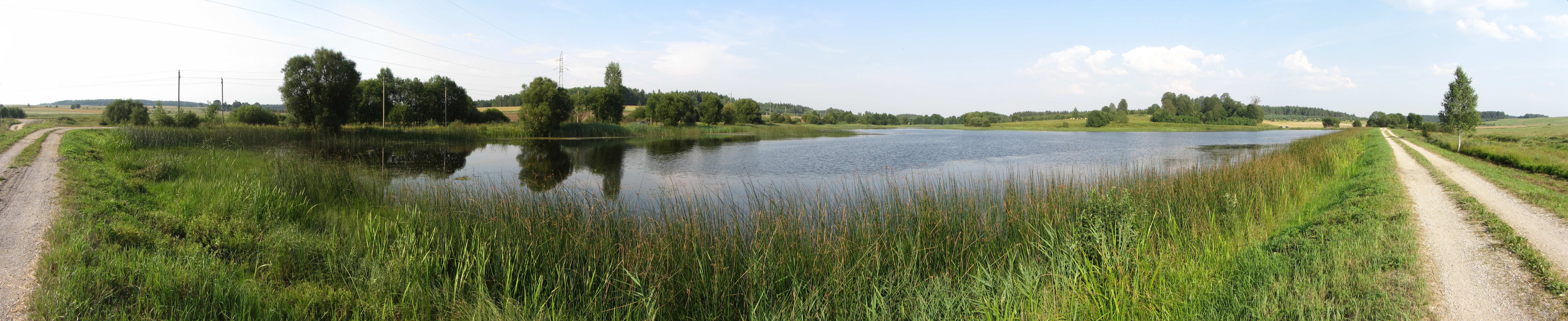 Turgelių sen., Lithuania